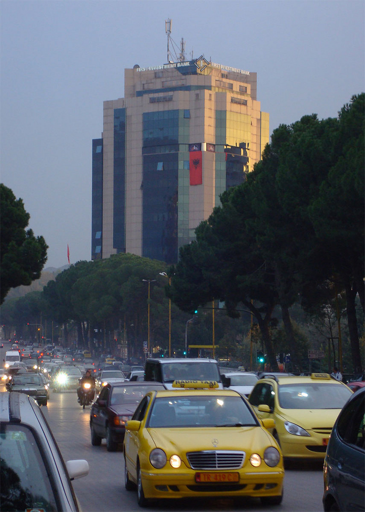 Traffico a Tirana